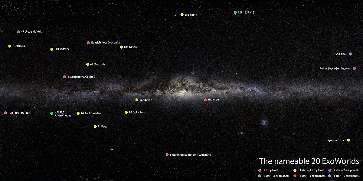 Localisation des systèmes du « top 20 » nommables dans le cadre de la campagne "NameExoWorlds".